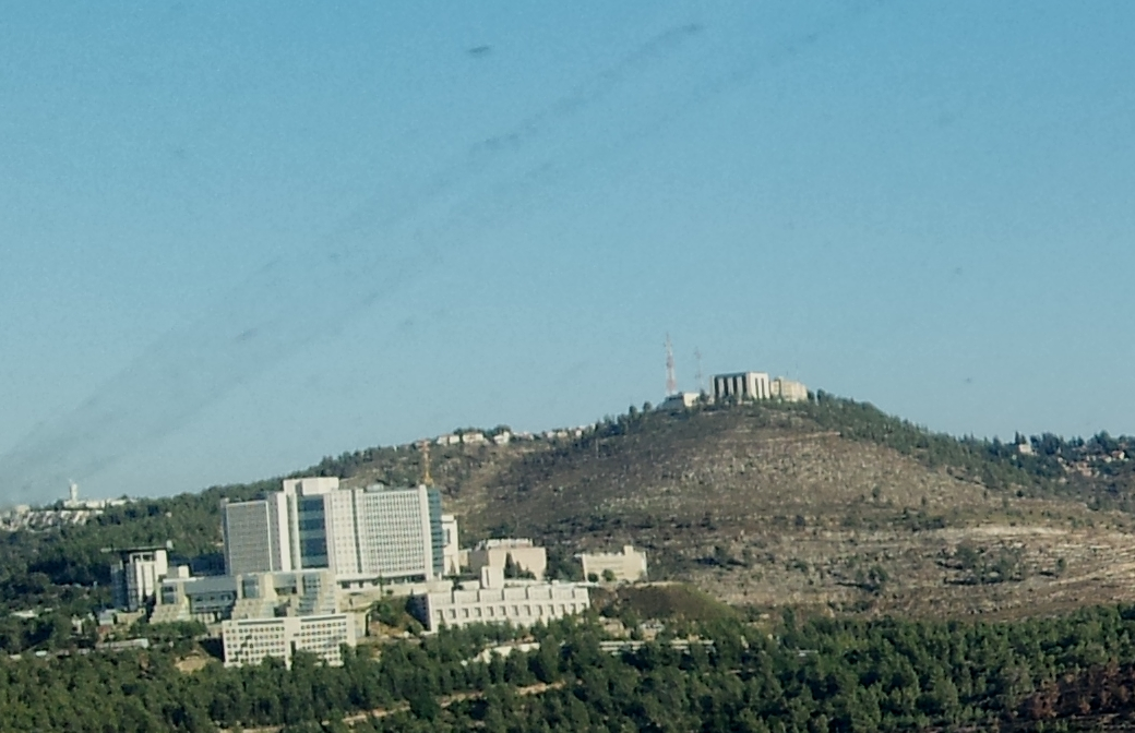 Hadassah Ein Karem Hospital Jerusalem and Orah mount